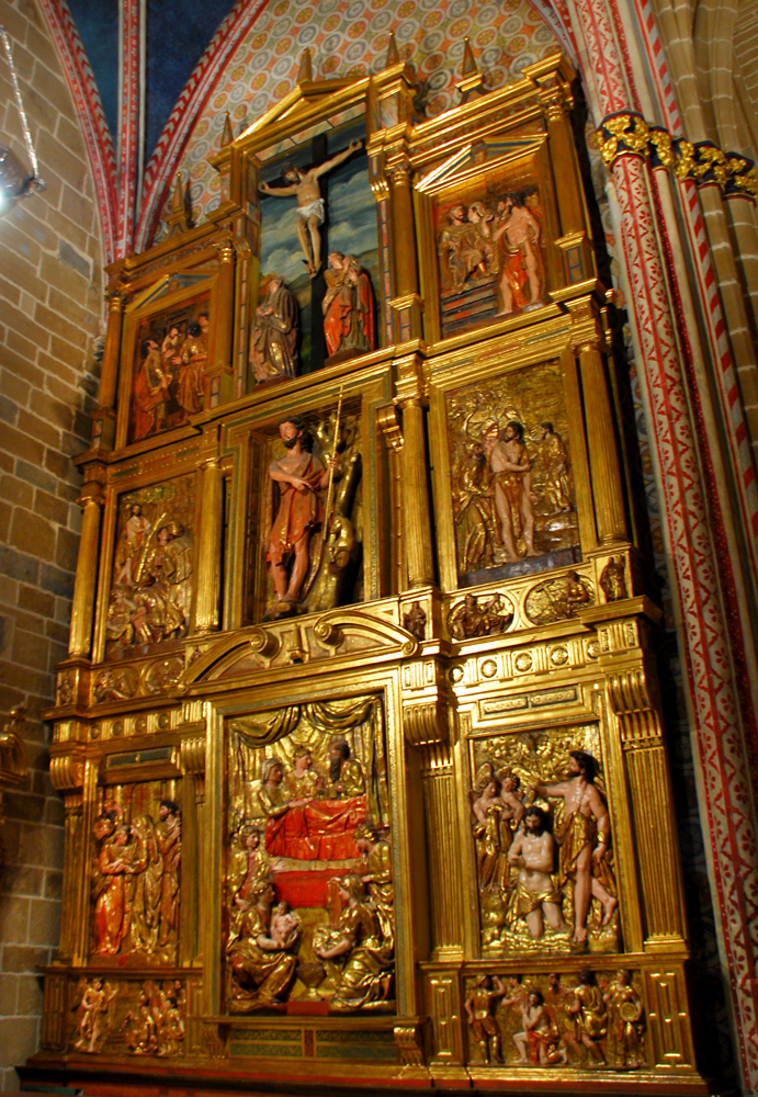 Retablo de San Juan Bautista, catedral de Pamplona